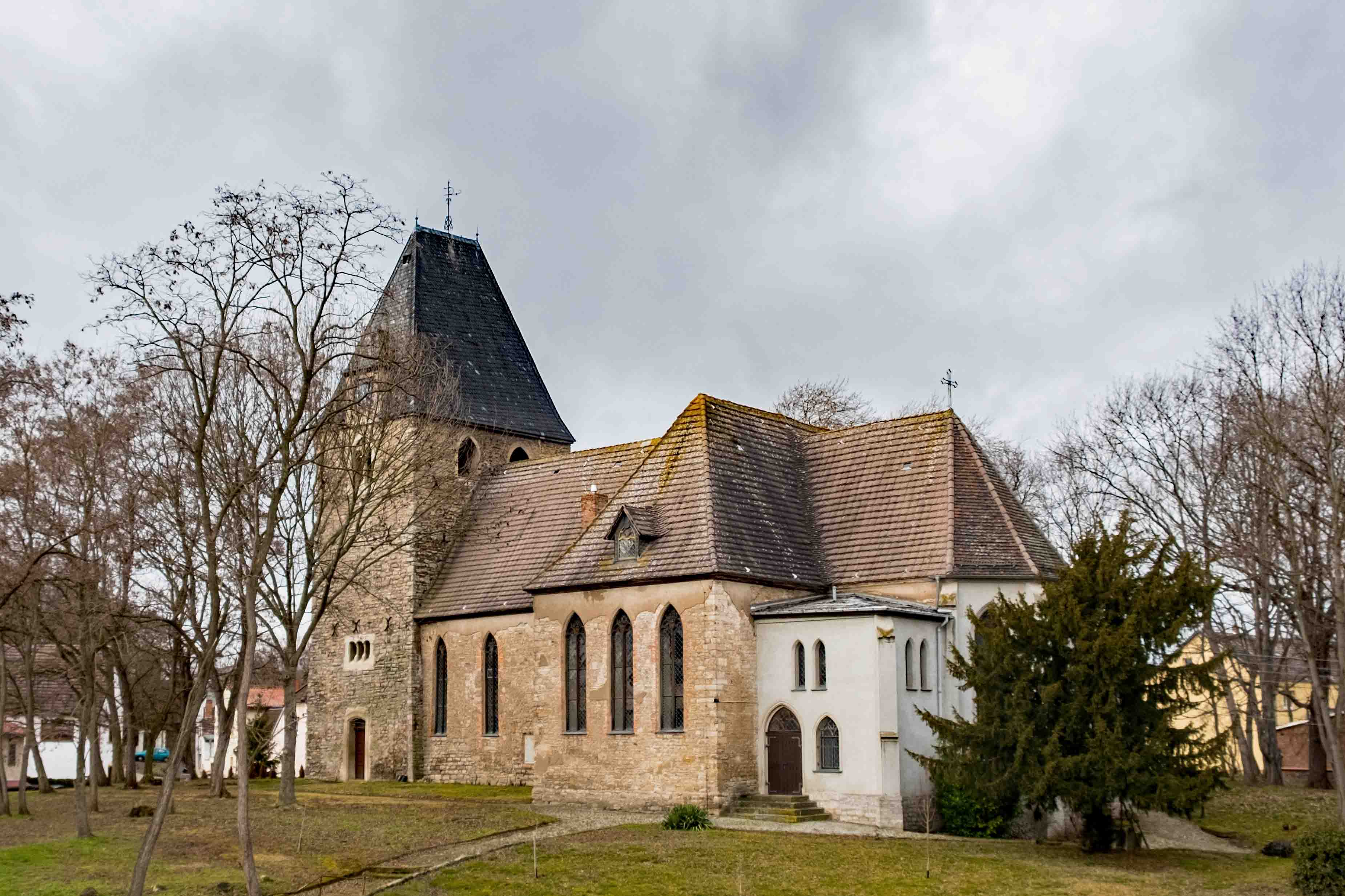 Dorfkirche St. Johannes u. St. Gertrud von der Breite aus gesehen